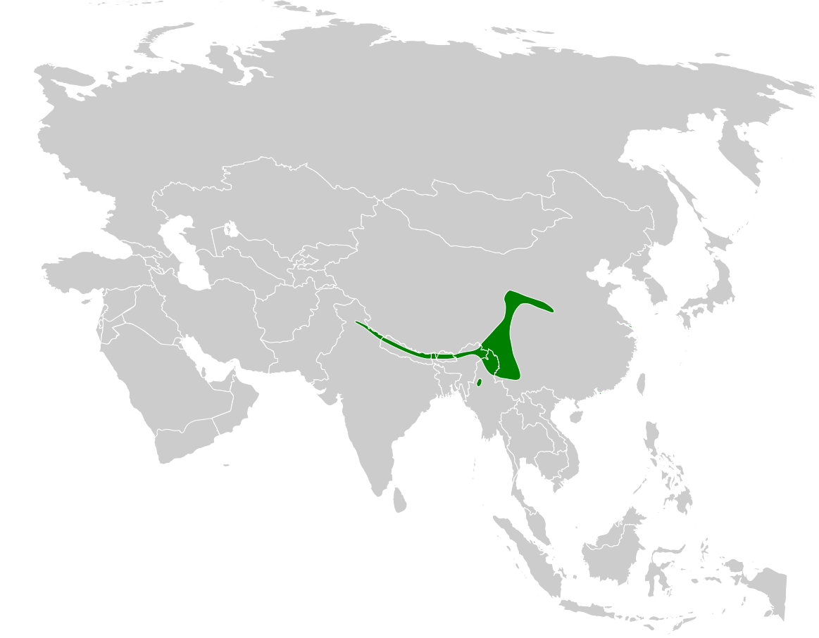 Periparus rubidiventris distribution map